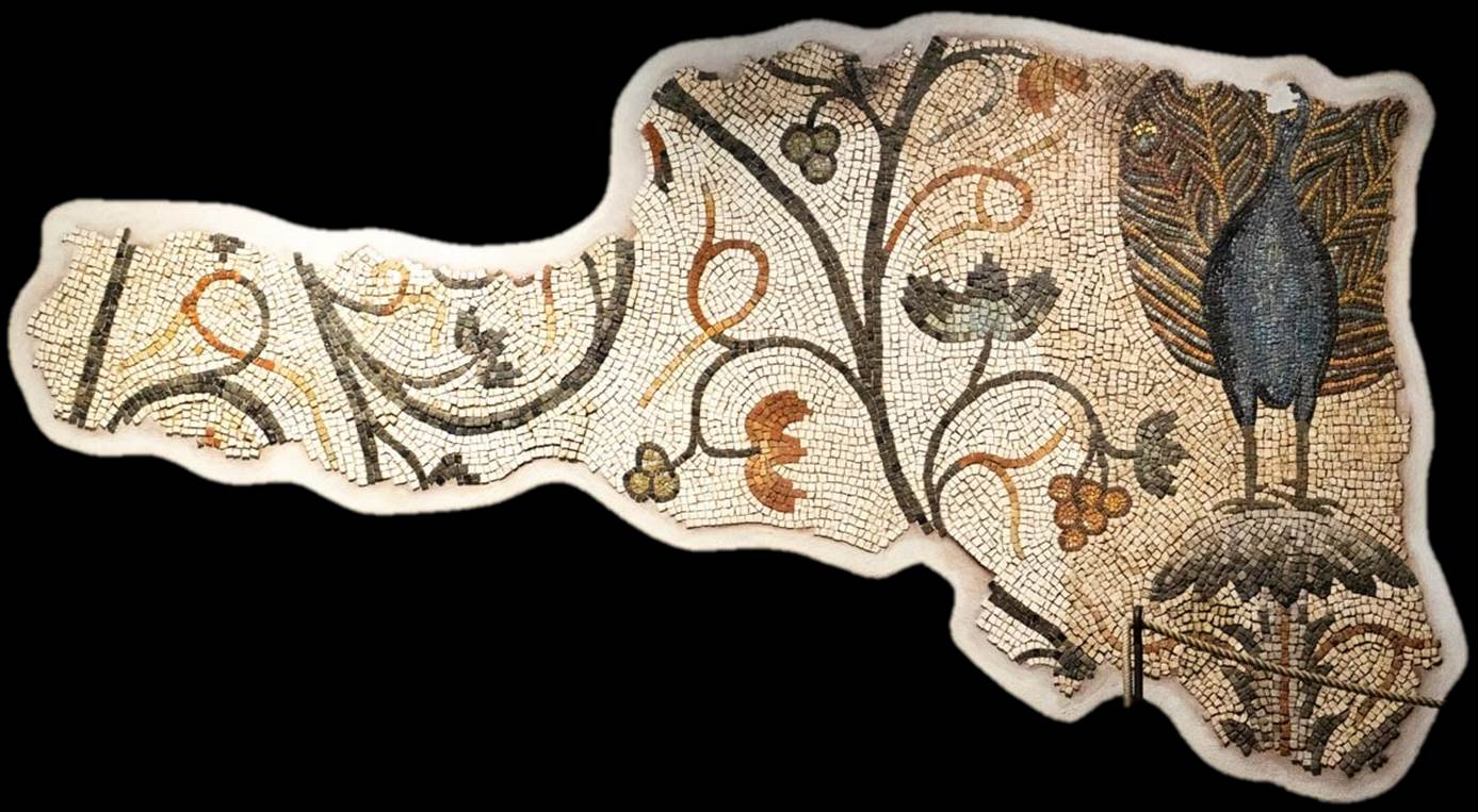 Peacock in Chromatiusroom